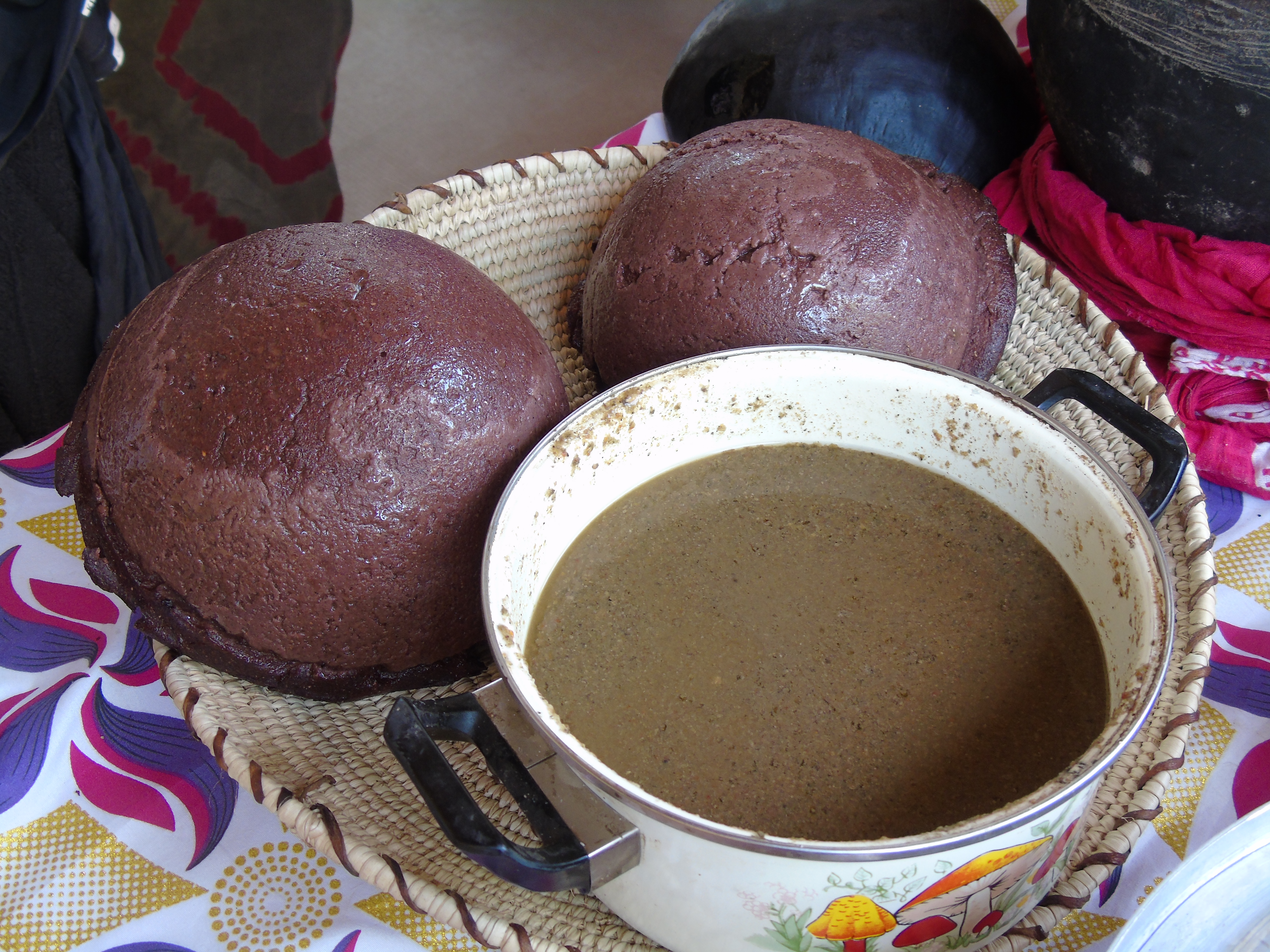 Un plat tchadien. De la boule au sorgho rouge accompagné de la sauce de gombo séché.